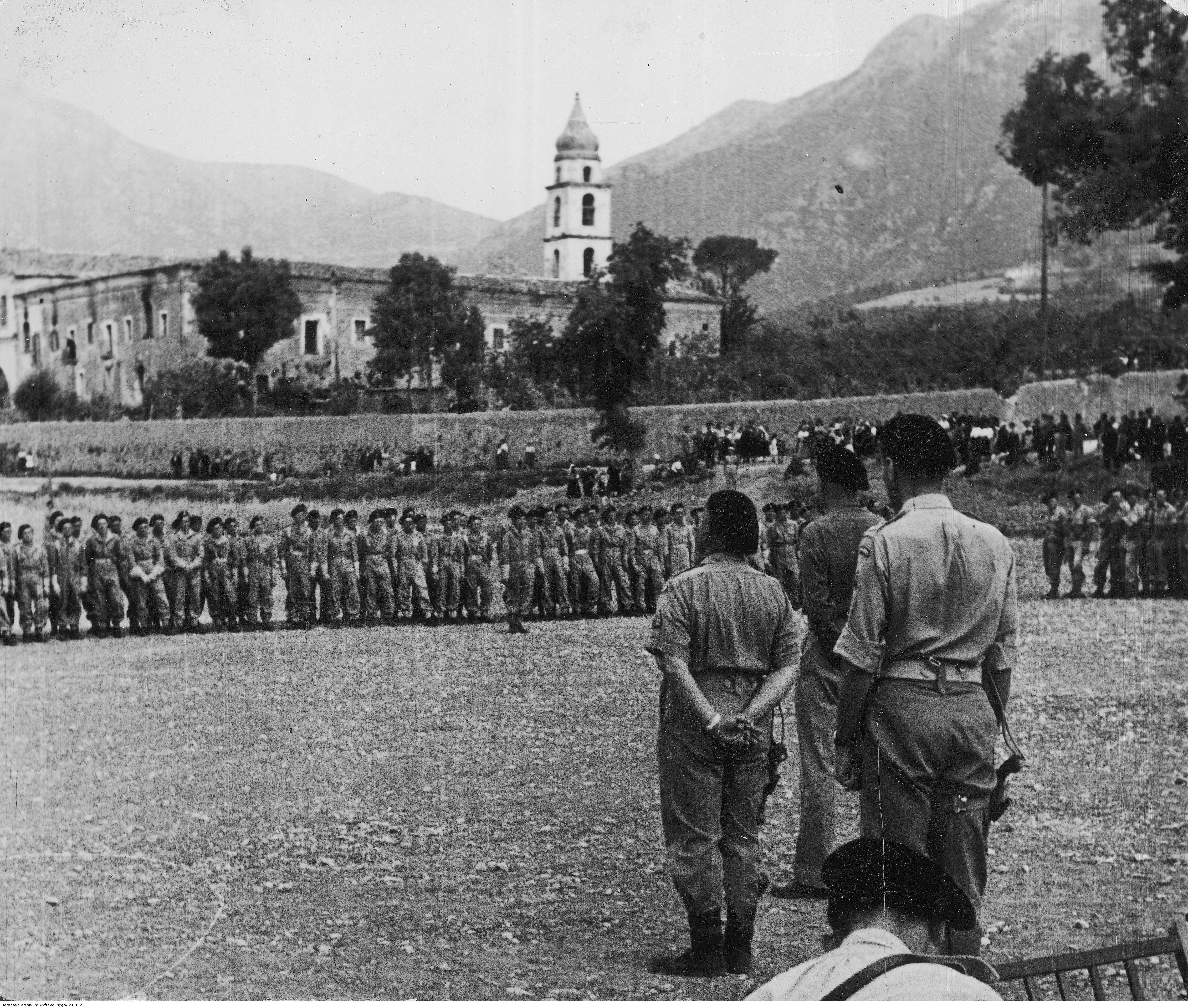 Samodzielna 2 Brygada Pancerna na froncie włoskim- przerwy w działaniach wojennych. Gen. Władysław Anders dziękuje żołnierzom Samodzielnej 2 Brygady Pancernej za walkę pod Monte Cassino; Prata Sannita, maj 1944. Archiwum Fotograficzne Tadeusza Szumańskiego. Sygnatura: 24-462-1